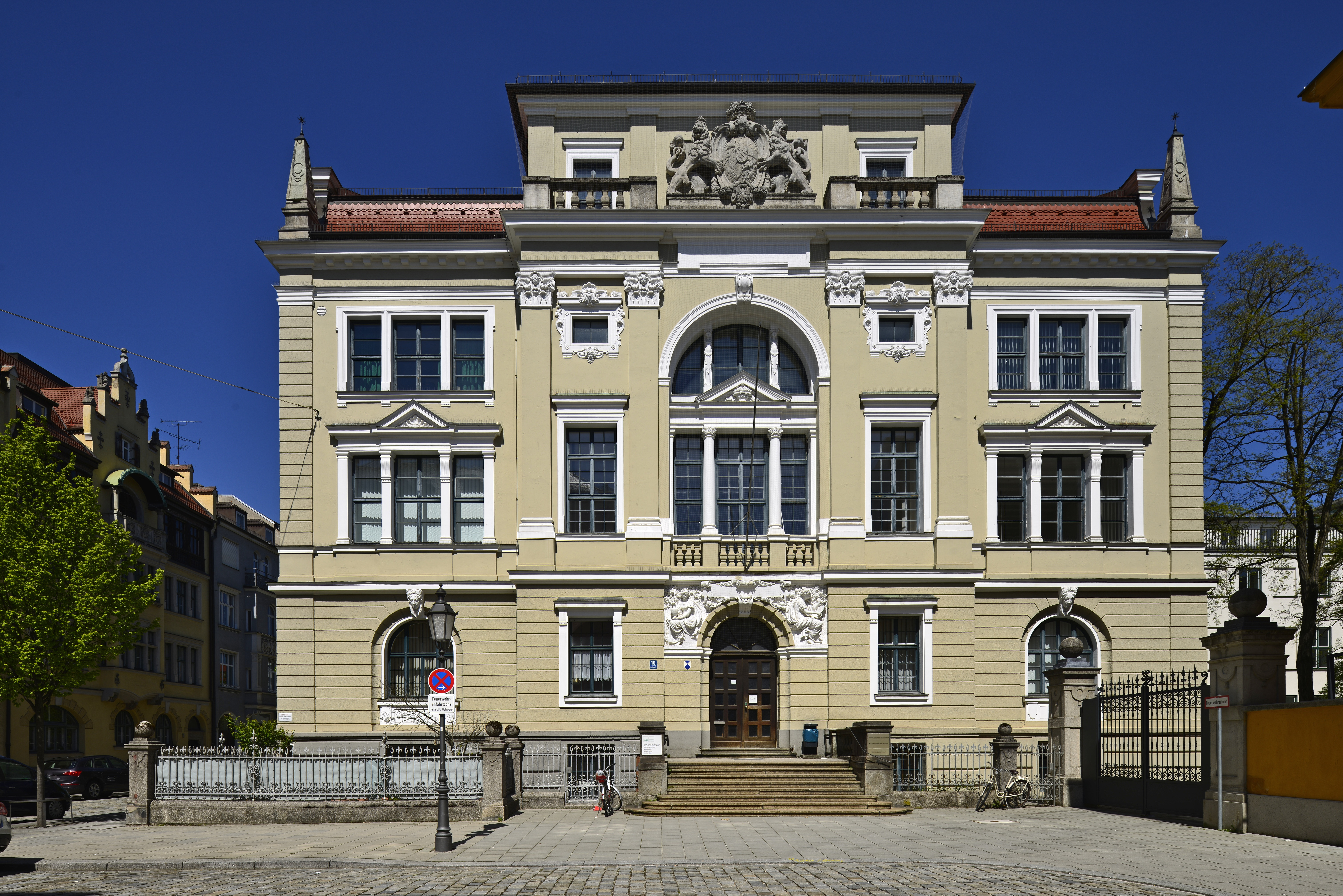 München, Richard-Wagner-Straße 10, Fassadenansicht Südseite.; Ehem. Teil der Kunstgewerbeschule für Künstlerinnen, jetzt Institut der Ludwig-Maximilians-Universität und Paläontologisches Museum, repräsentativer Neubarockbau, mit von Arkaden umgebenem Lichthof, 1899-1902 von Leonhard Romeis; an der Südseite plastischer Schmuck, Freitreppe und Vorgarten mit Pfeilerzaun.